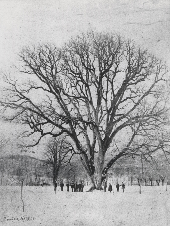 Fotografia dell'albero di noce esistente a Brinzio in località Verdago, abbattuto nel 1887. Lo scatto inquadra l'albero (al centro di un paesaggio innevato), ai piedi del quale - e anche fra i suoi rami - si scorgono le figure di alcuni uomini. Materia/tecnica: albumina/carta